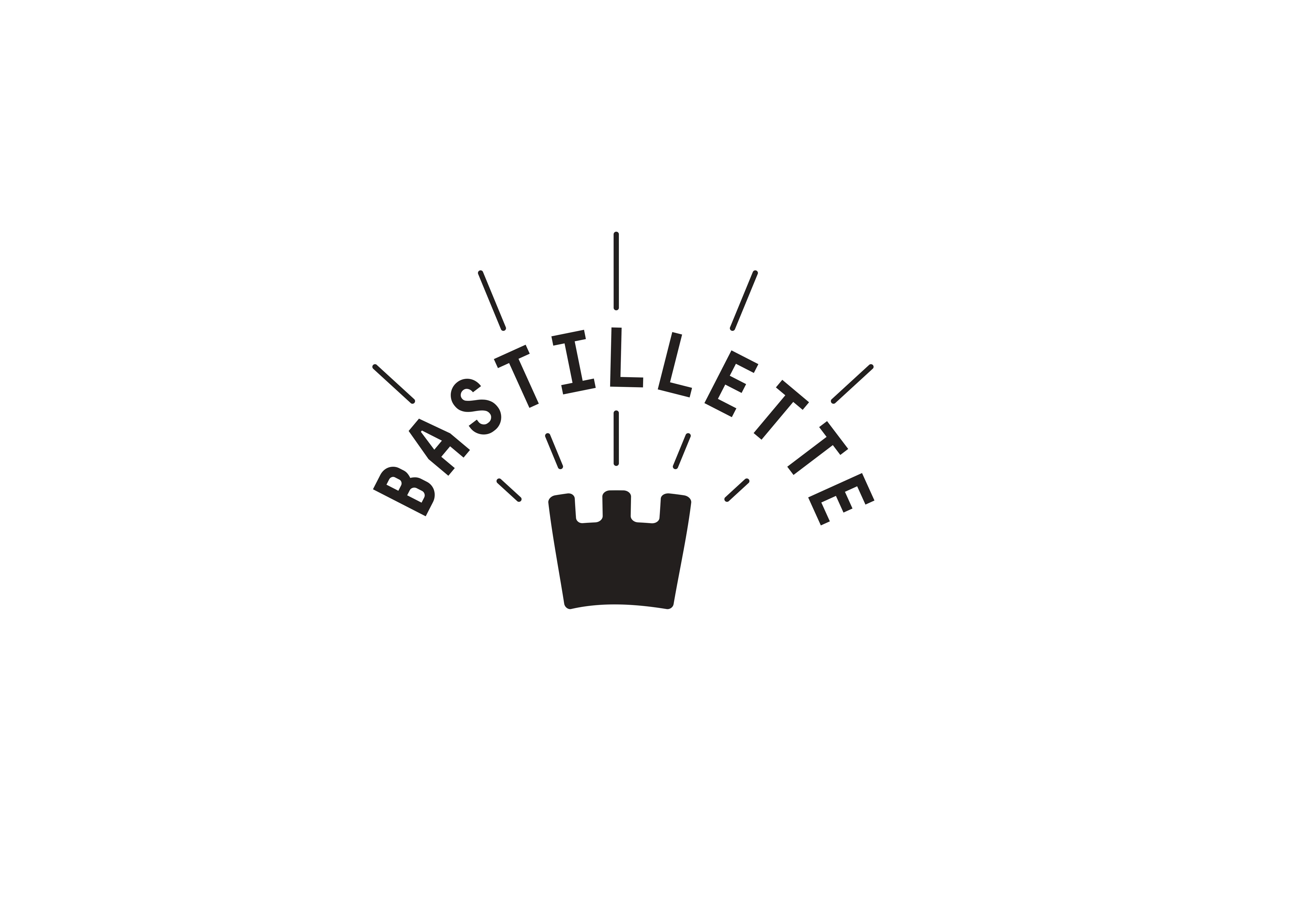 Logo de La Bastillette créé par le graphiste Philippe Zaslonov